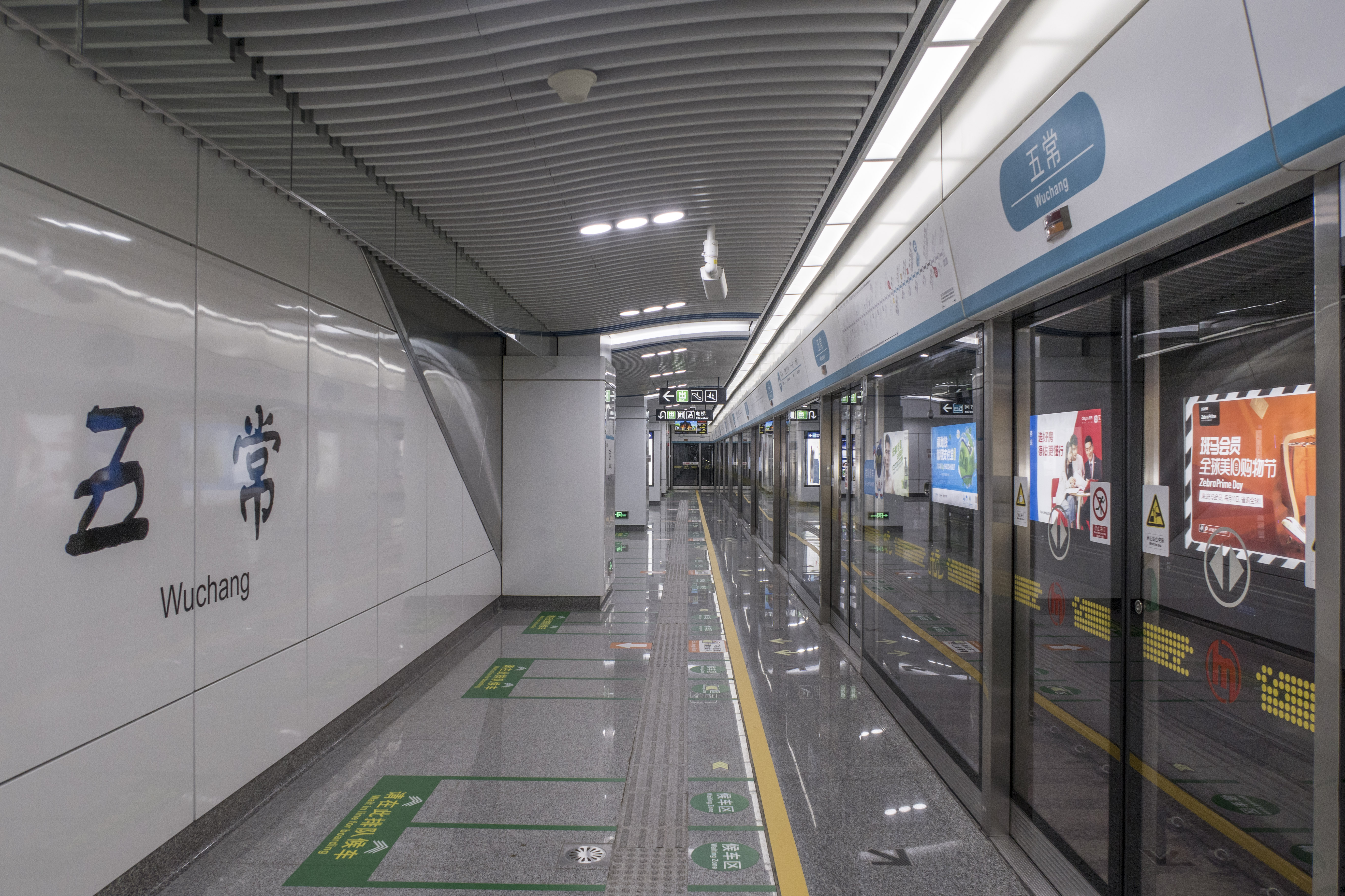 杭州地铁五常站